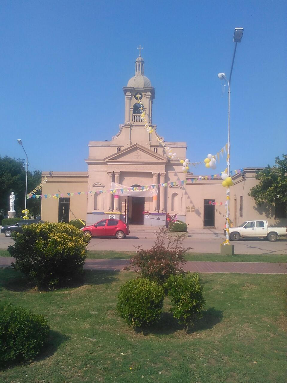 Iglesia Santa Rosa de Lima vista desde la Plaza San Martin. General Levalle, Córdoba, Argentina